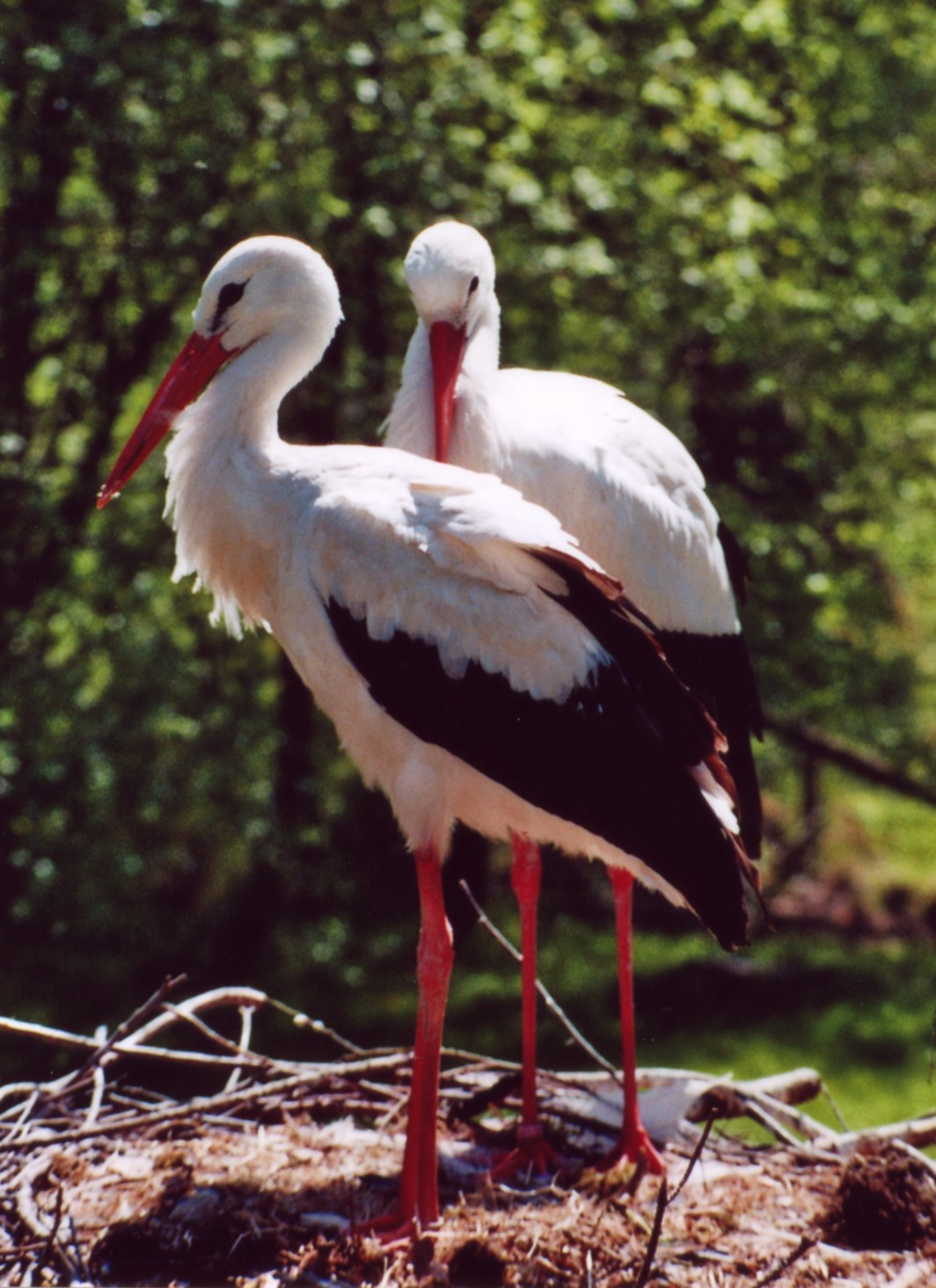 Weißstorch